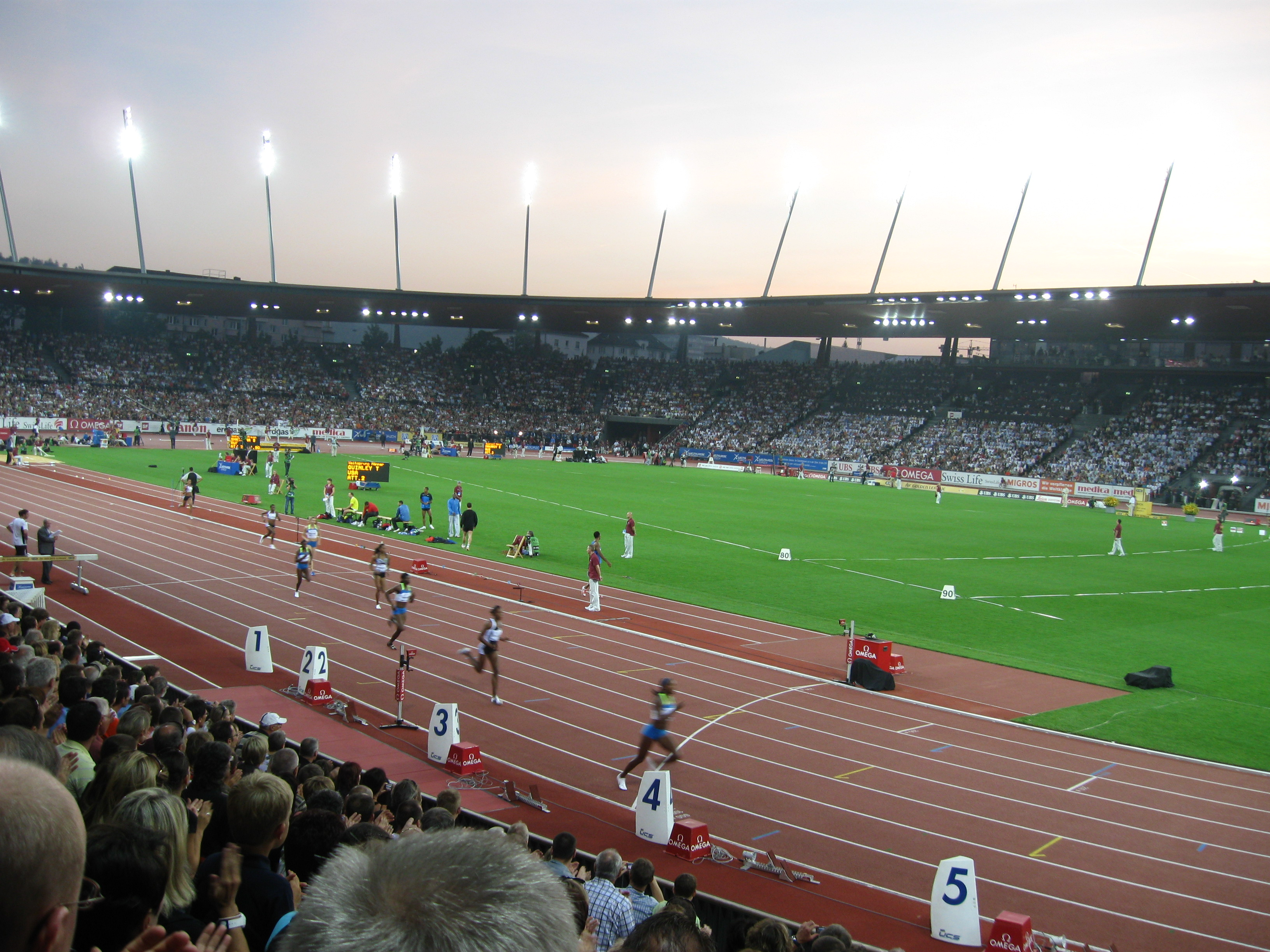 Weltklasse at Letzigrund on 29 August 2008.